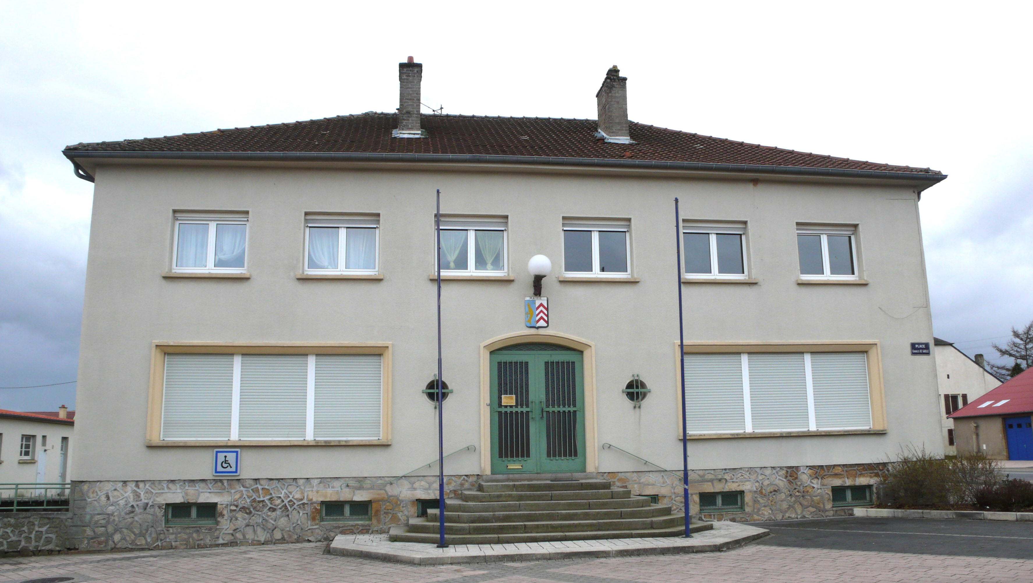 Gemeng Tressange.